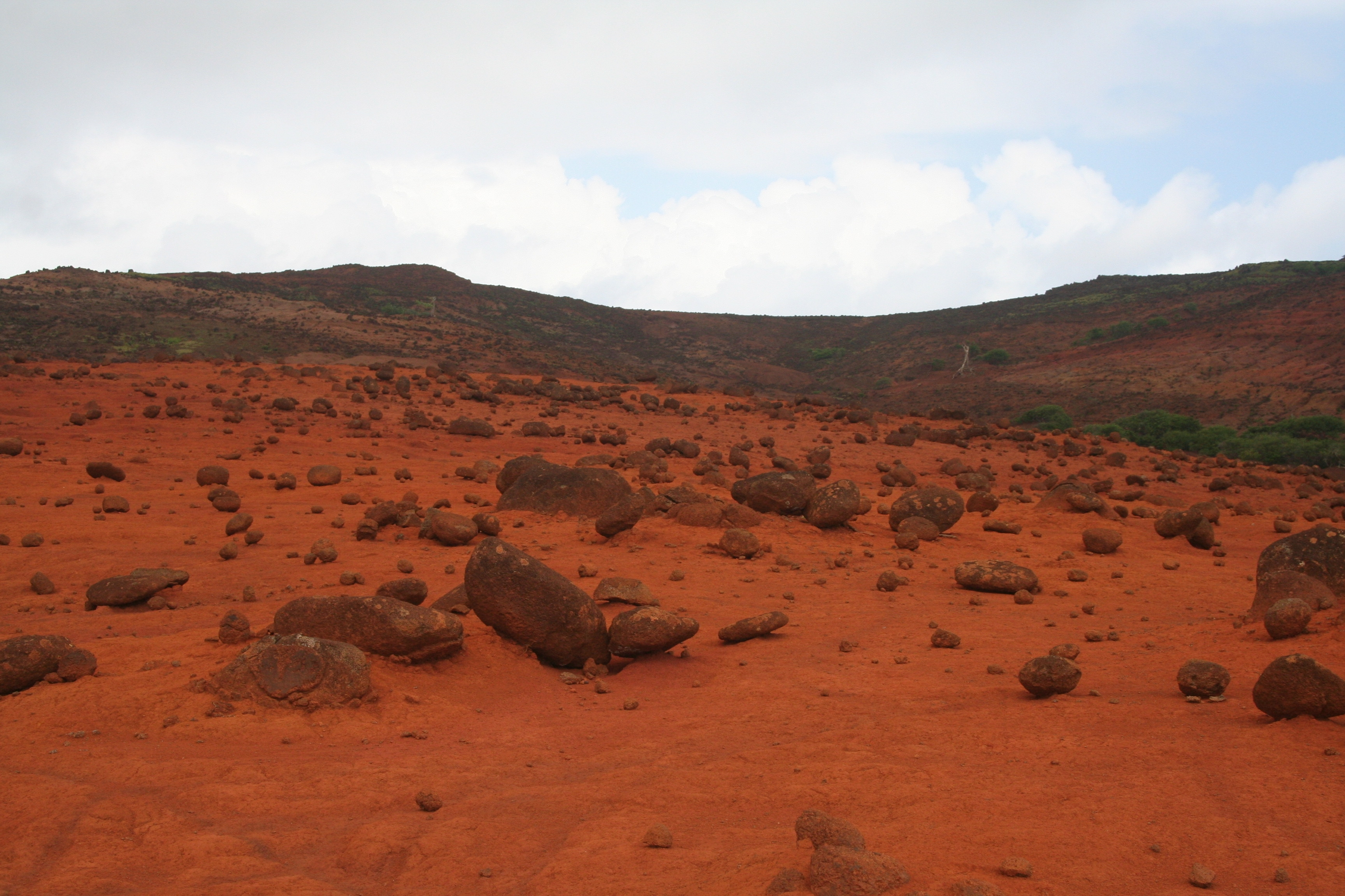 EIAO: L'île est gravement érodée suite à l'introduction et à la prolifération de moutons et de porcs. Photo prise durant la mission scientifique de la DIREN de Polynésie Française